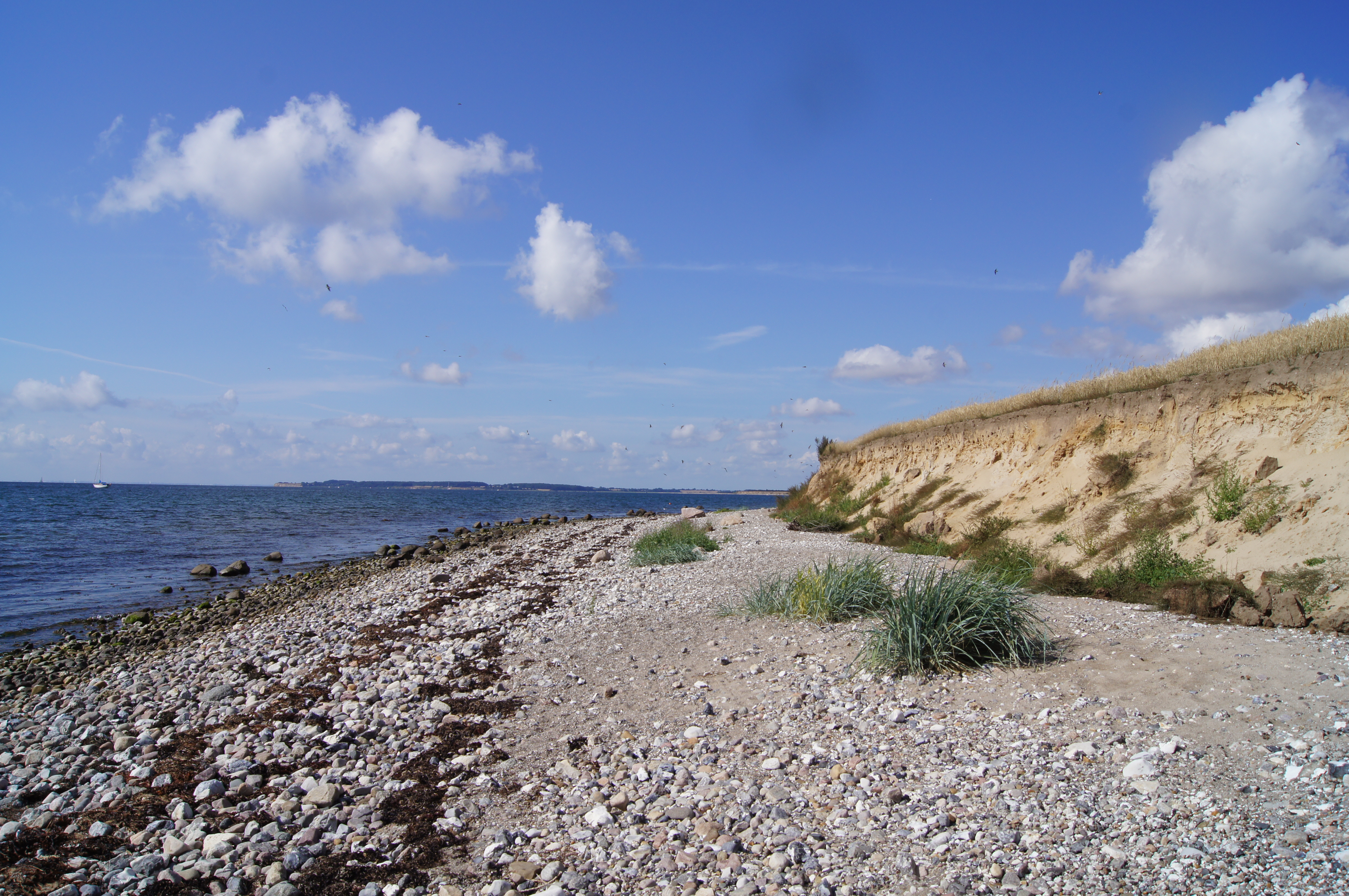 Årø Südstrand